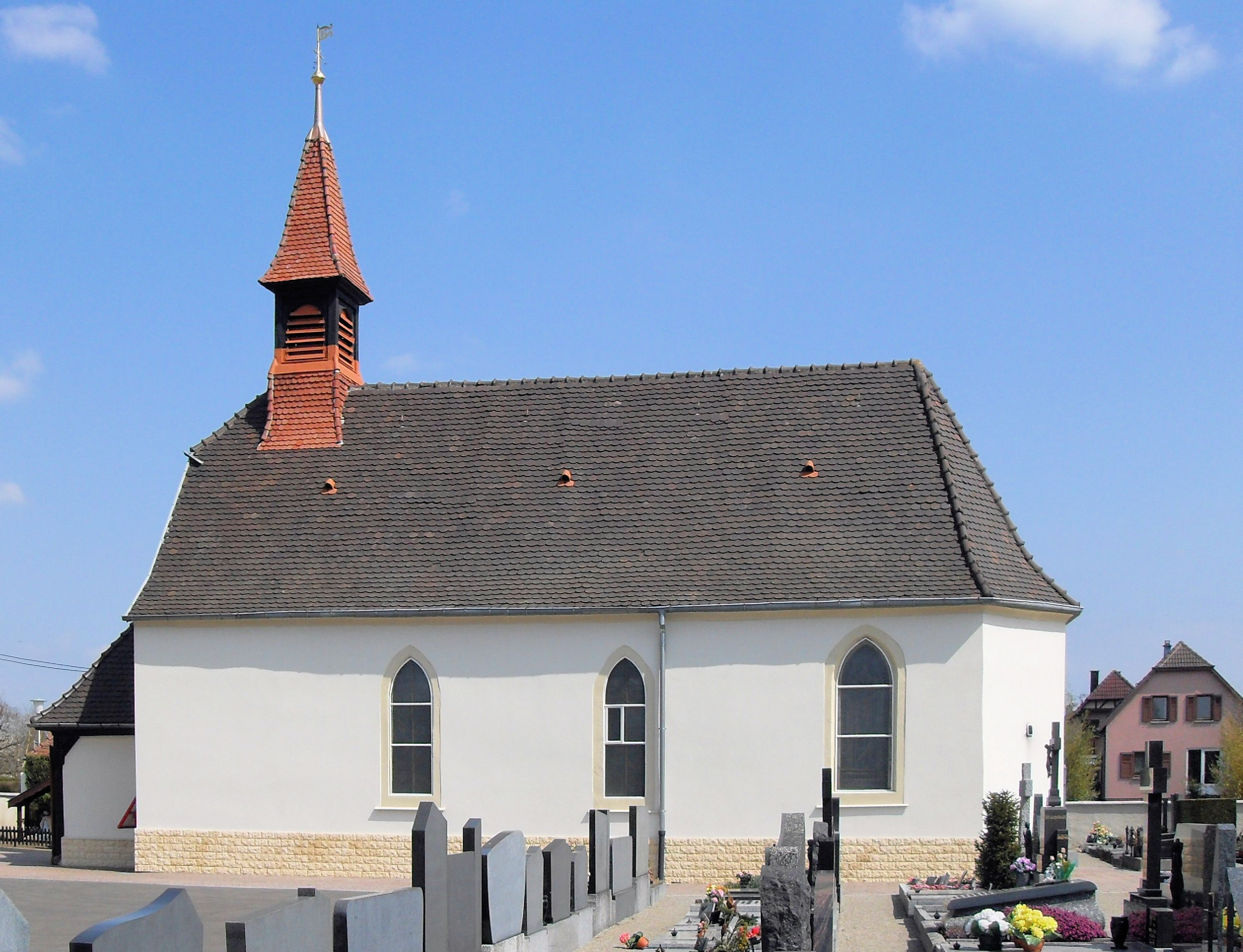 Chapelle Notre-Dame des Champs à Habsheim